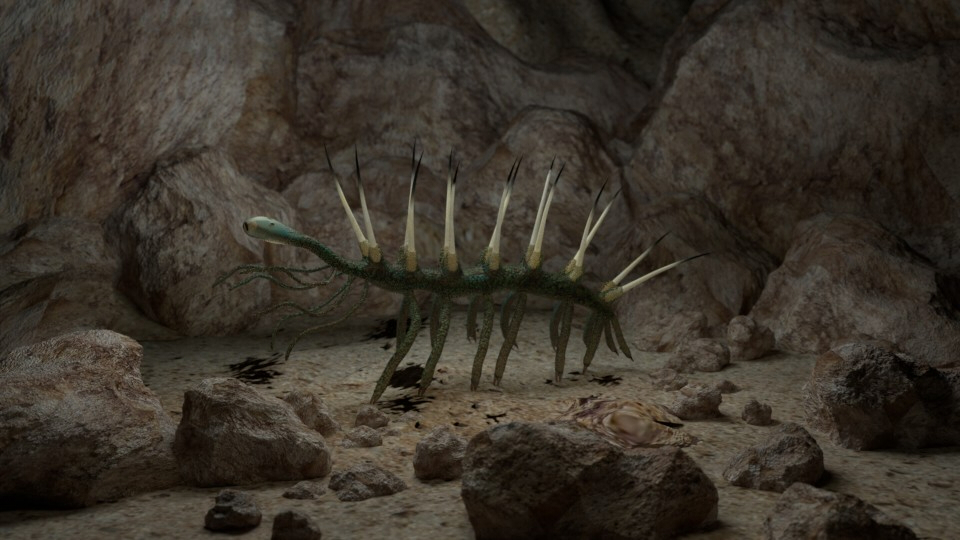 Reconstrucción de Hallucigenia, según los trabajos de Martin R. Smith1 & Jean-Bernard Caron (2015)